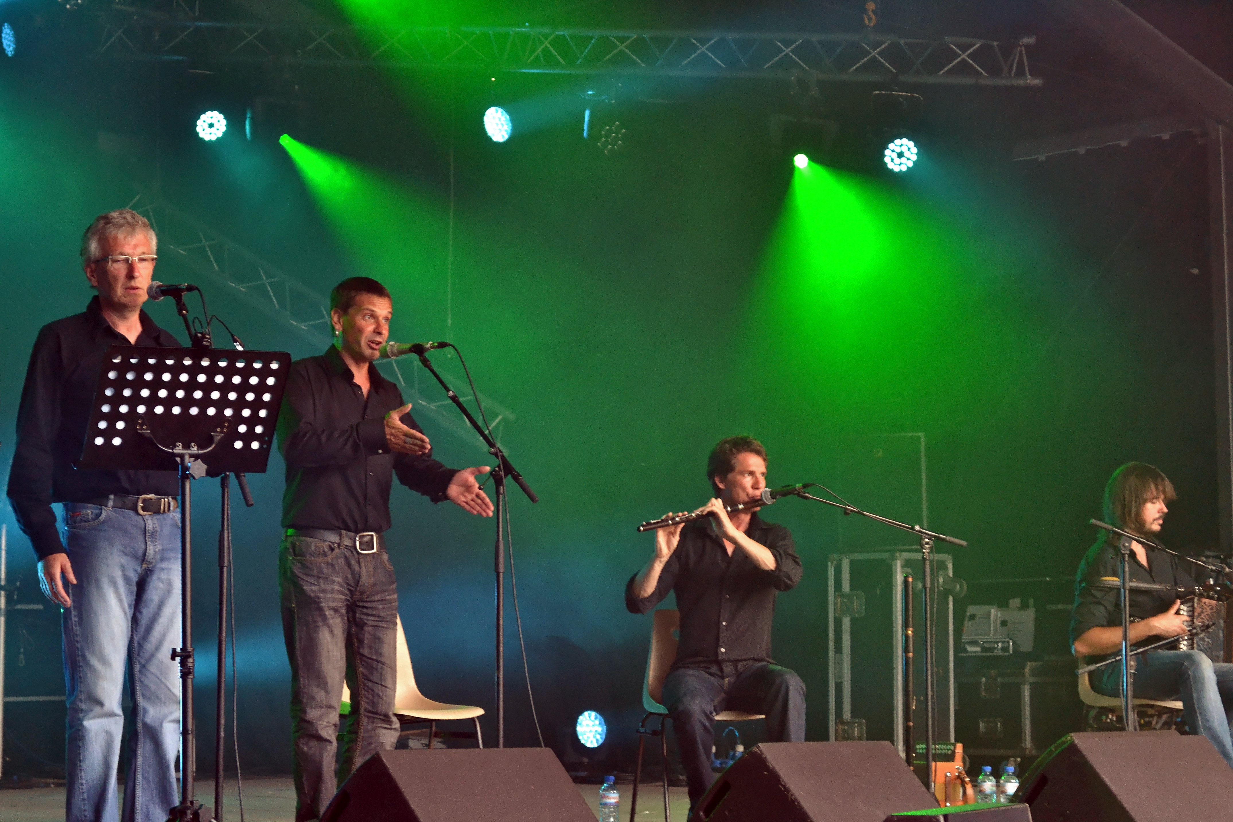 Joa Trio en concert à l'espace Pierre-Jakez Hélias lors du festival de Cornouaille le 22 juillet 2014.